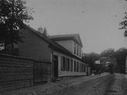 Vallikraavi tänav 1890